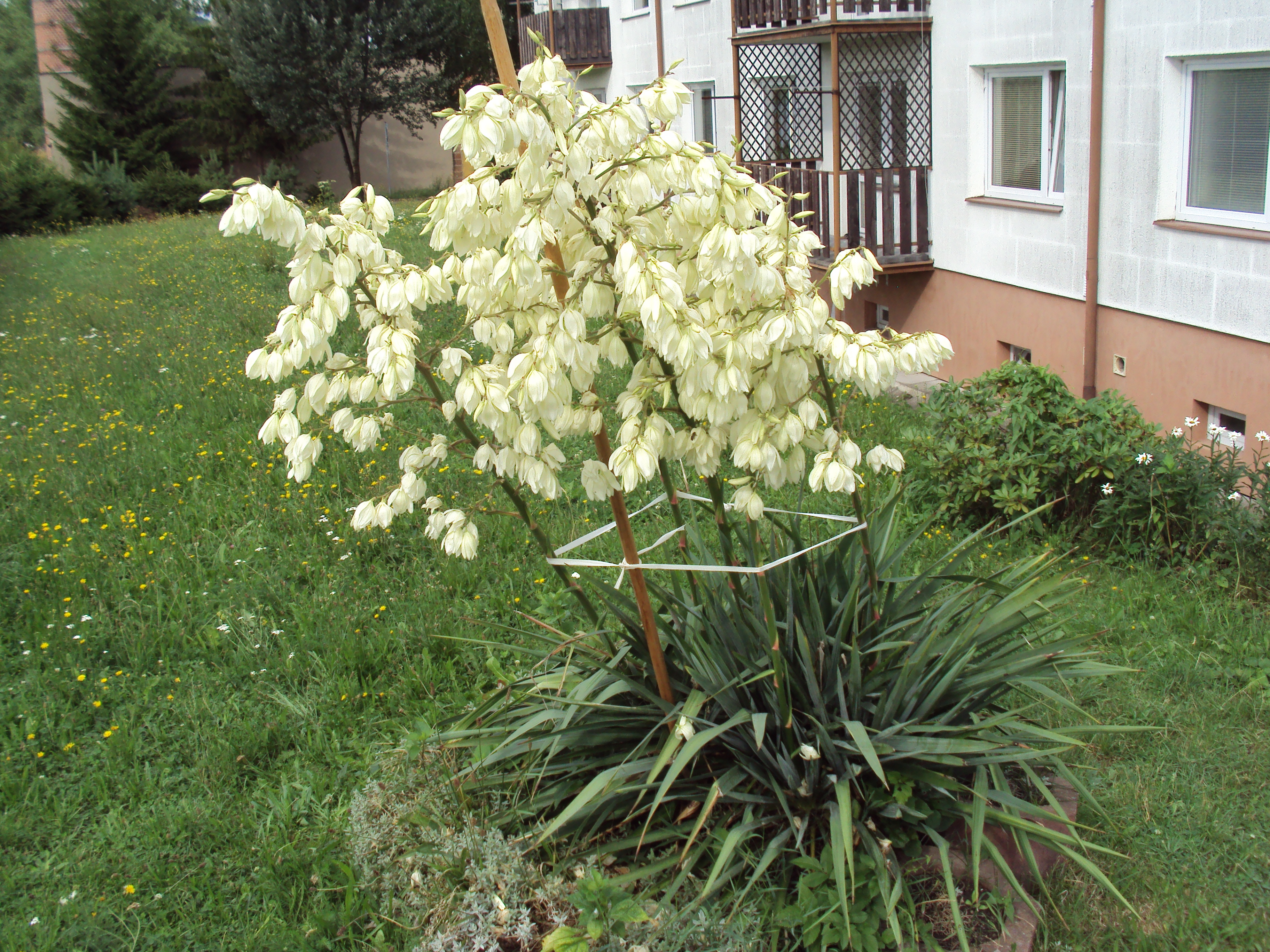 Yuka, Yuca či Yucca mexická na sídlišti Nové Zákupy